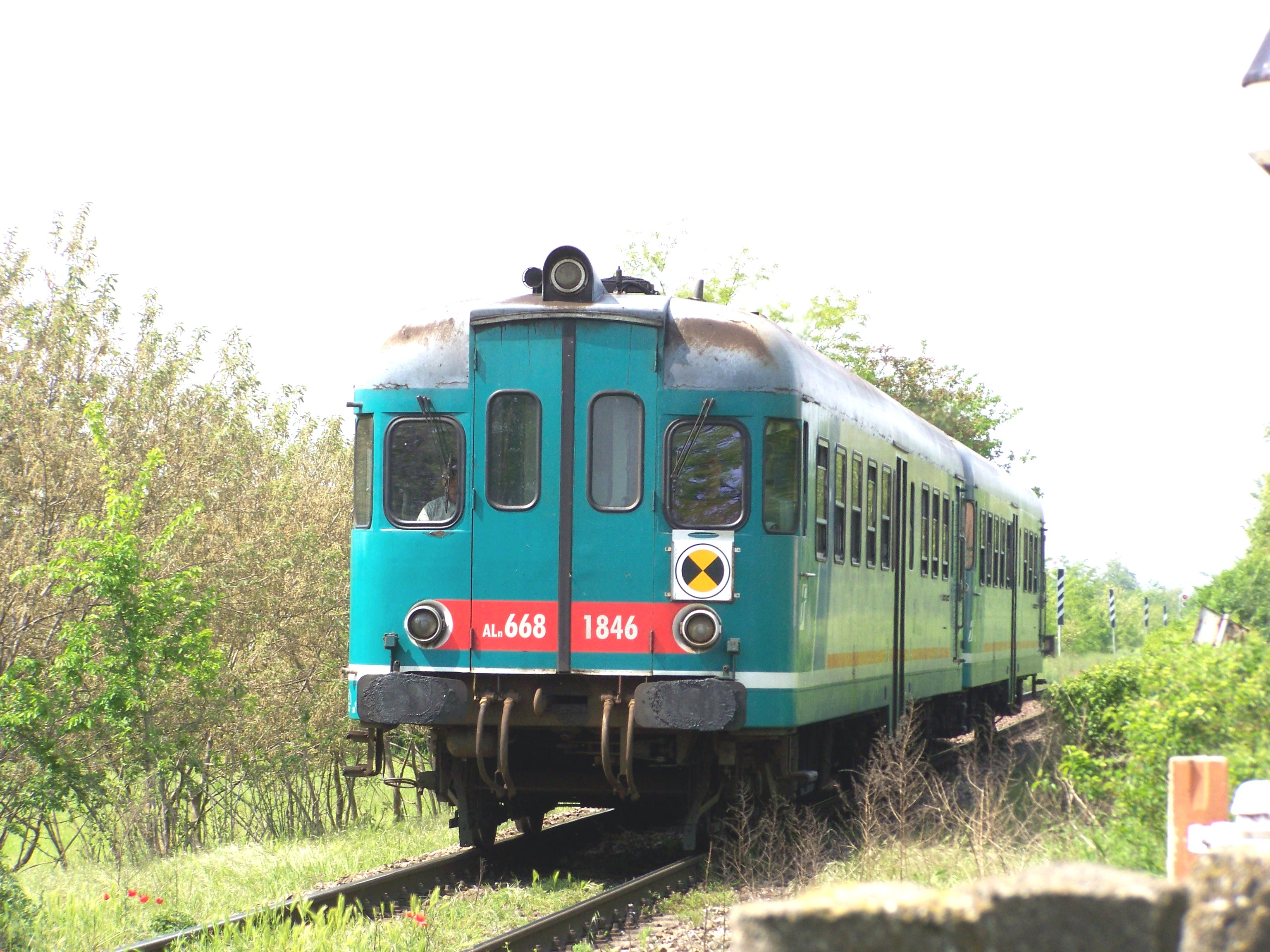 Automotrice ALn 668.1846 che effettua servizio regionale sulla Parma-Piadena-Brescia mentre sta per giungere al passaggio a livello di via Pedrona a Montirone.